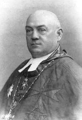 Fotografie Františka Xavera Marata